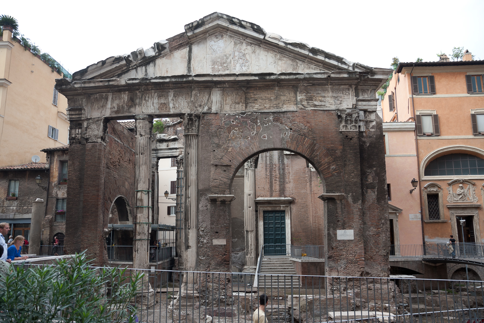 Portico di Ottavia